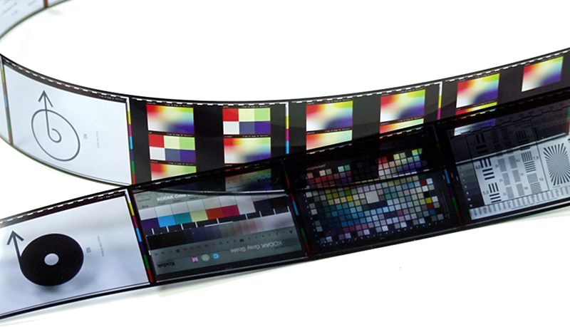 Image data rendered with archiumFilmCreator and exposed with Fraunhofer IPM laser-recorder on ILFOGRAPHIC (CMM) Microfilm